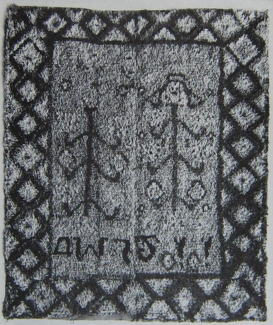 Dubbelnockad prydnadsrya, nedåtsidan är omönstrad. Ryan kommer från Östuna socken, och är daterad 1733 (Ur Nordiska museets samlingar).